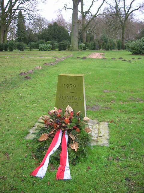 Gedenkstätte für die Opfer der Luftangriffe auf Wesermünde auf dem Bremerhavener Friedhof in Wulsdorf.